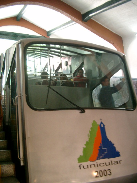 A funicular car on Monserrate Hill in Bogotá, Colombia.